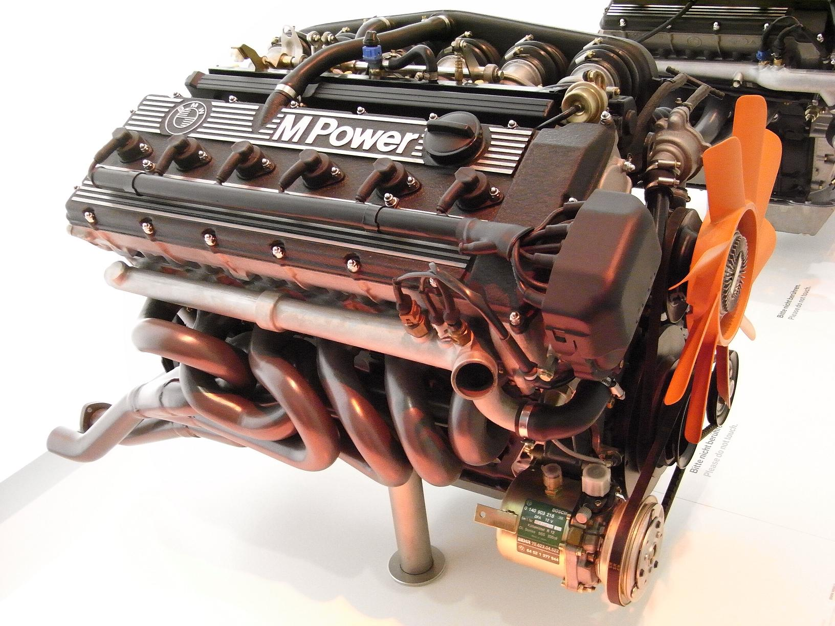 BMW-Motor M88/3 für den M635 CSi, Auspuffseite mit Fächerkrümmer (aufgenommen BMW Museum)